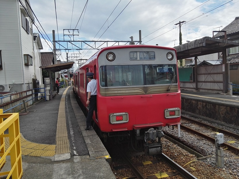 A train with a conductor stops at Katahara station.